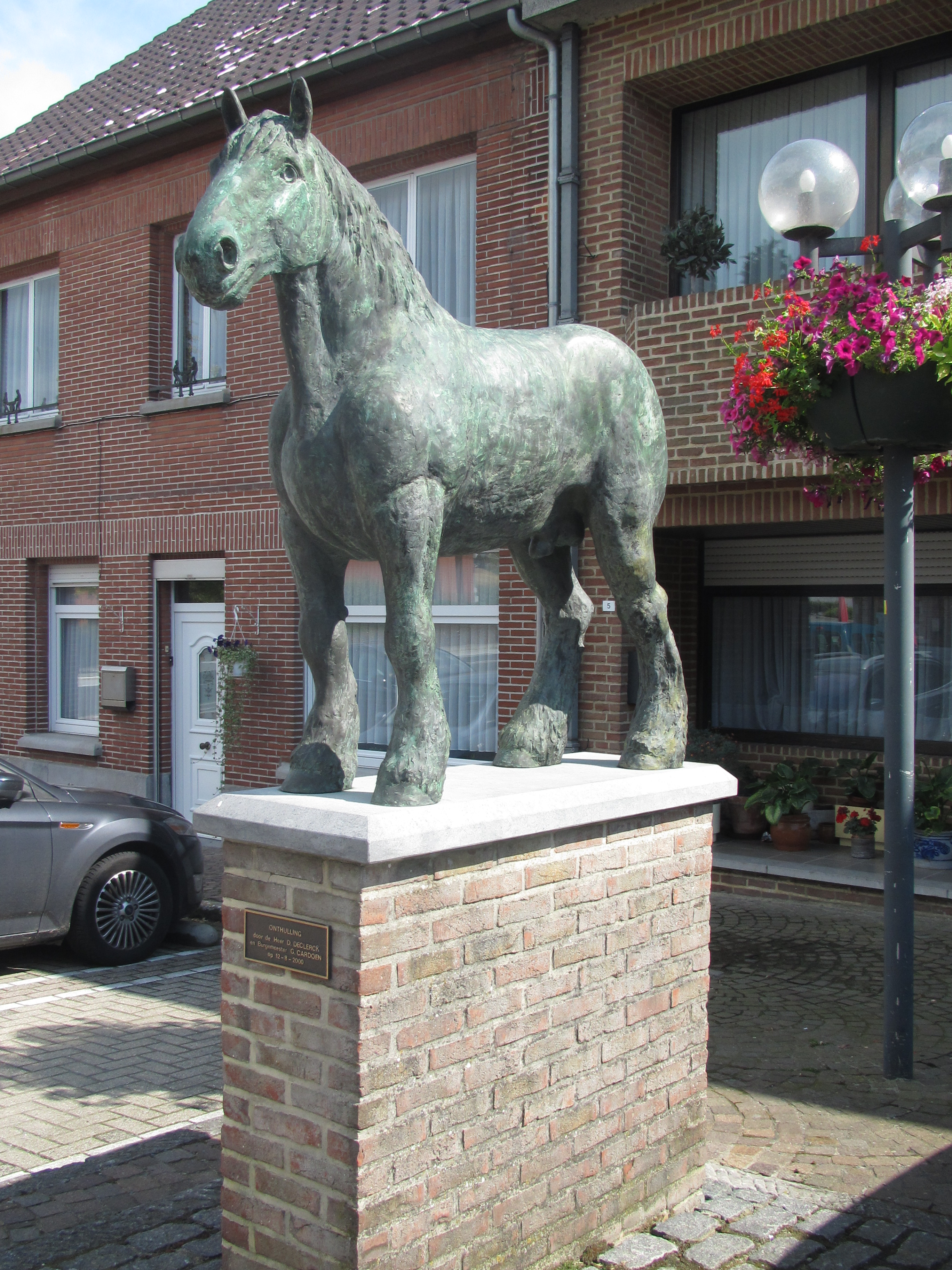 Het standbeeld van het Belgisch trekpaard Brillant (1868-1893) tegenover het Museum van het Belgisch Trekpaard, gelegen aan het Oudstrijdersplein 4 te 1570 Vollezele